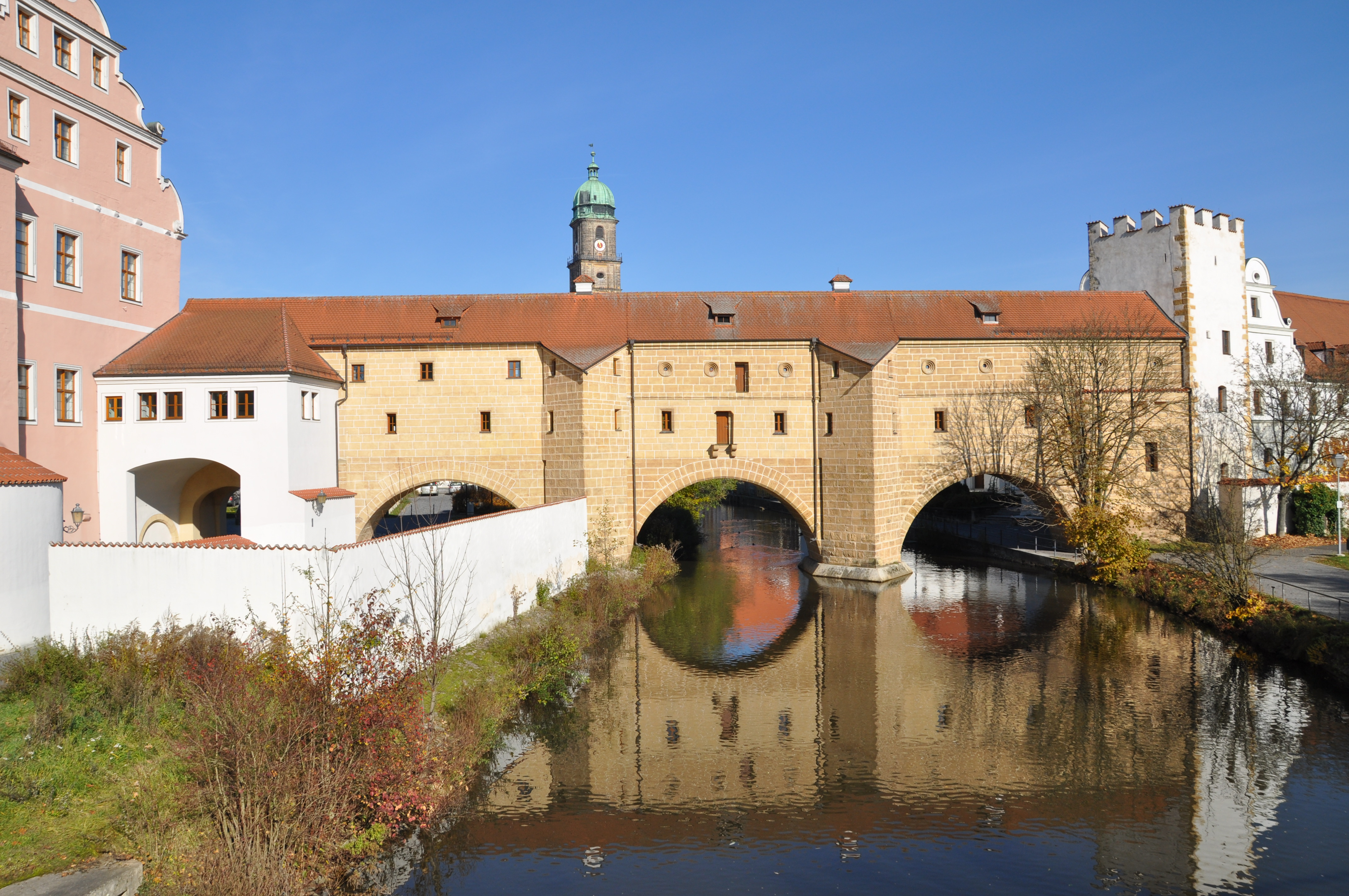 Die Stadtbrille verbindet als Teil des Schlosskomplexes das ehem. kurfürstliche Schloss (links) mit dem Zeughaus (rechts)This is a photograph of an architectural monument.